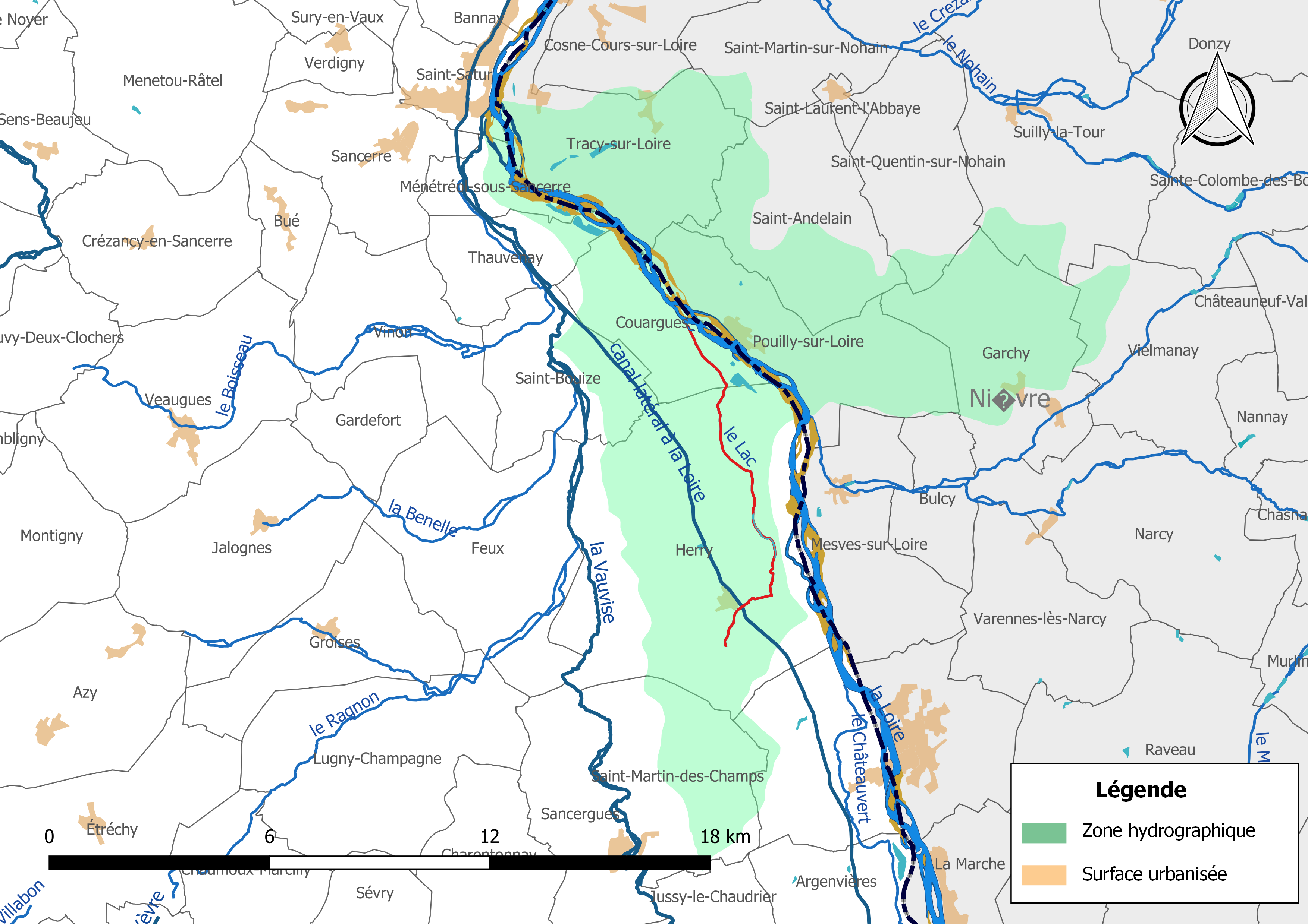 Carte du cours d'eau « le Lac » (France) et de la zone hydrographique dans laquelle il s'insère.